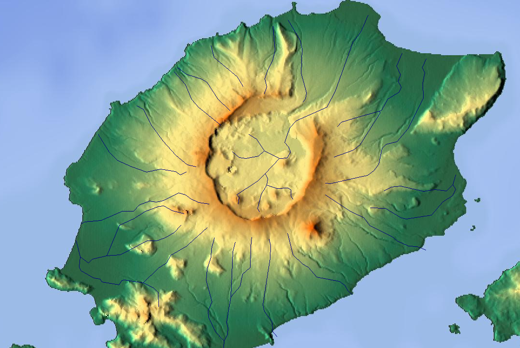 Relief map of Okmok Caldera, Unmak Island